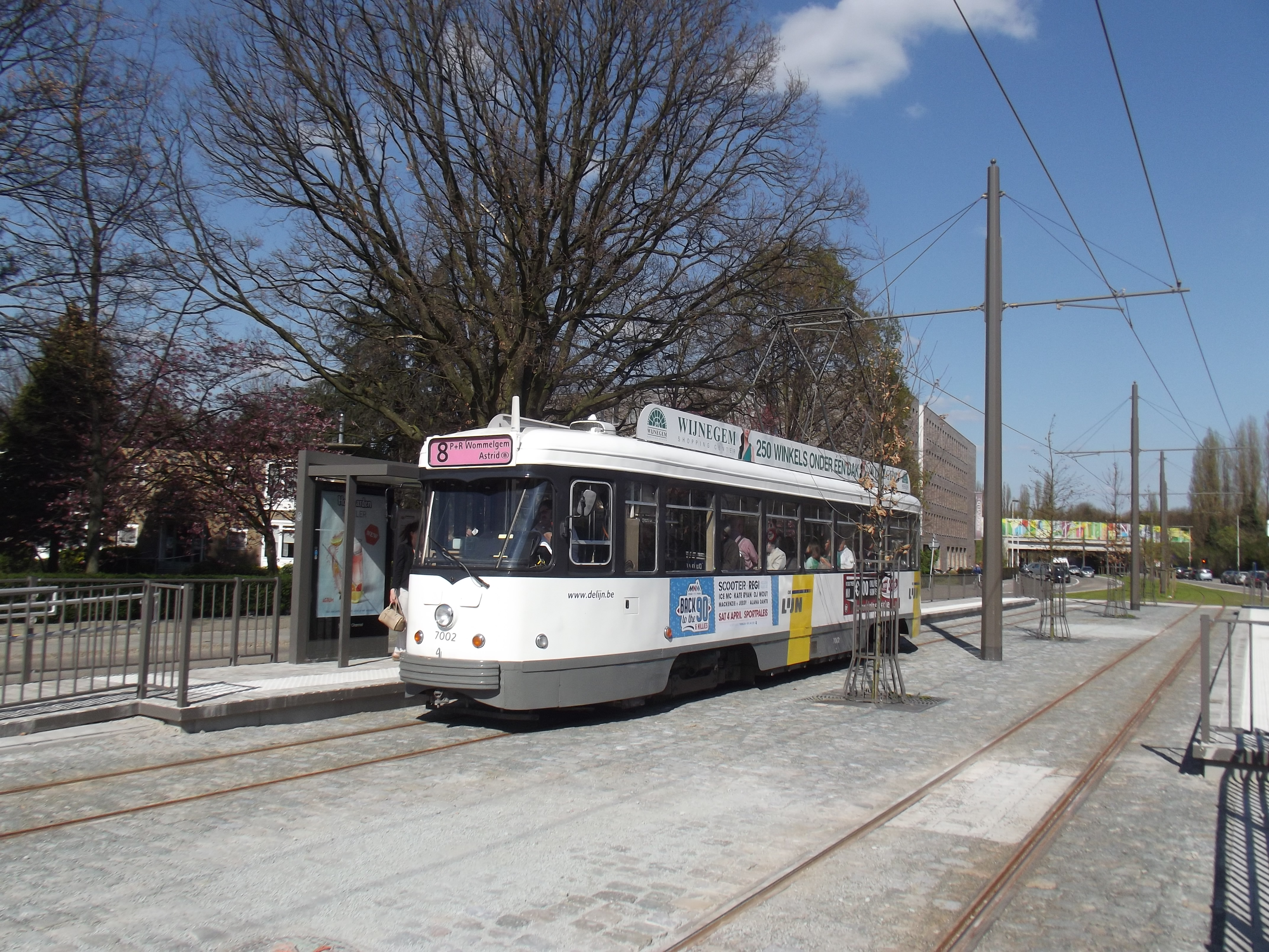 Nieuwe tramhalte Burgemeester De Boey van tramlijn 8